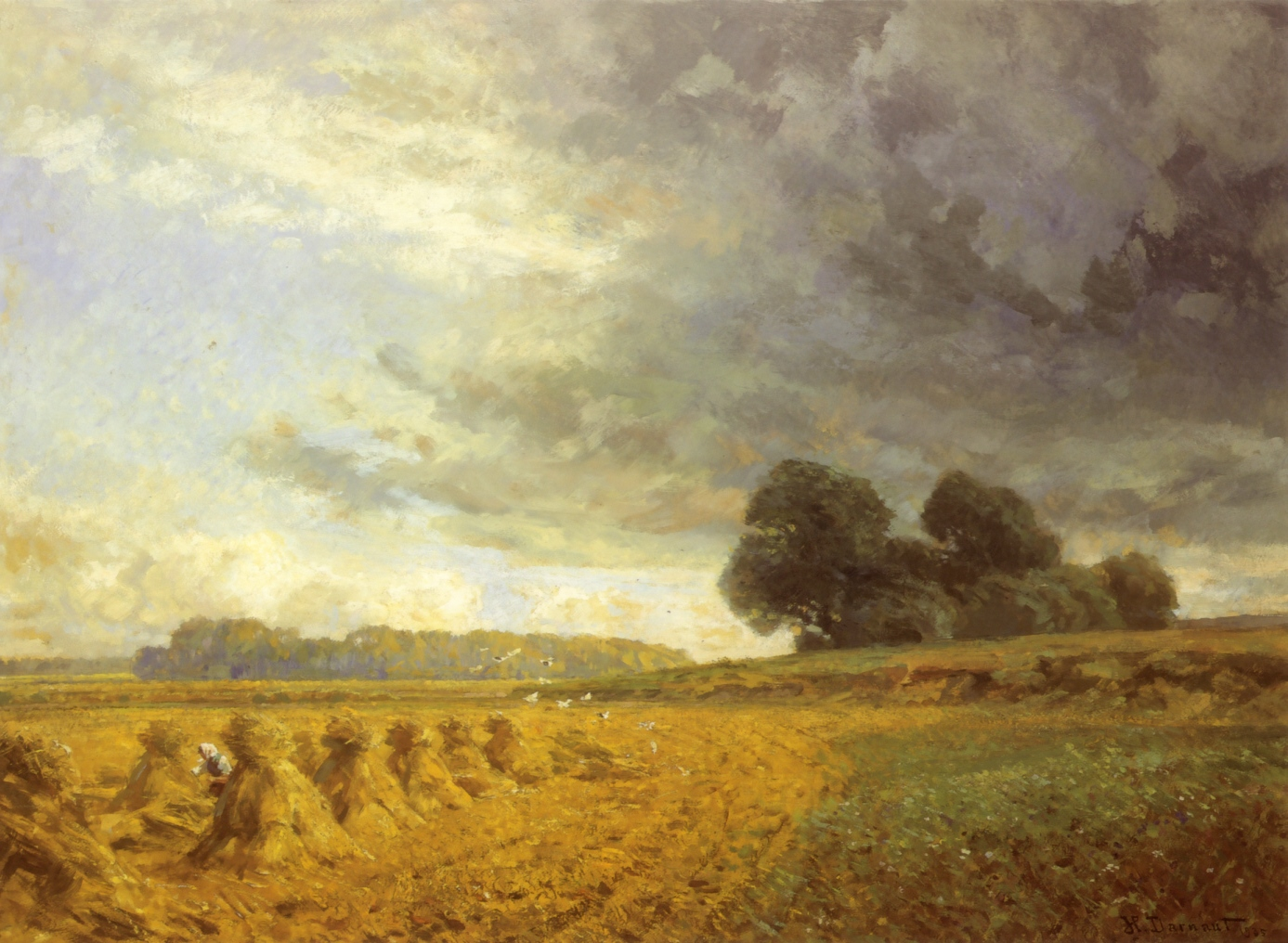 Kornernte